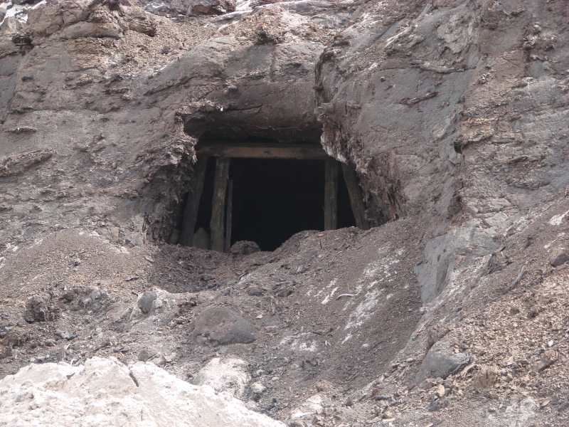 Das erste Lausitzer Flöz, wurde im Tiefbau gefördert. Reste eines Ganges, der bei der Abbaggerung des Deckgebirges zur Förderung des zweiten Lausitzer Flözes freigelegt wurde.